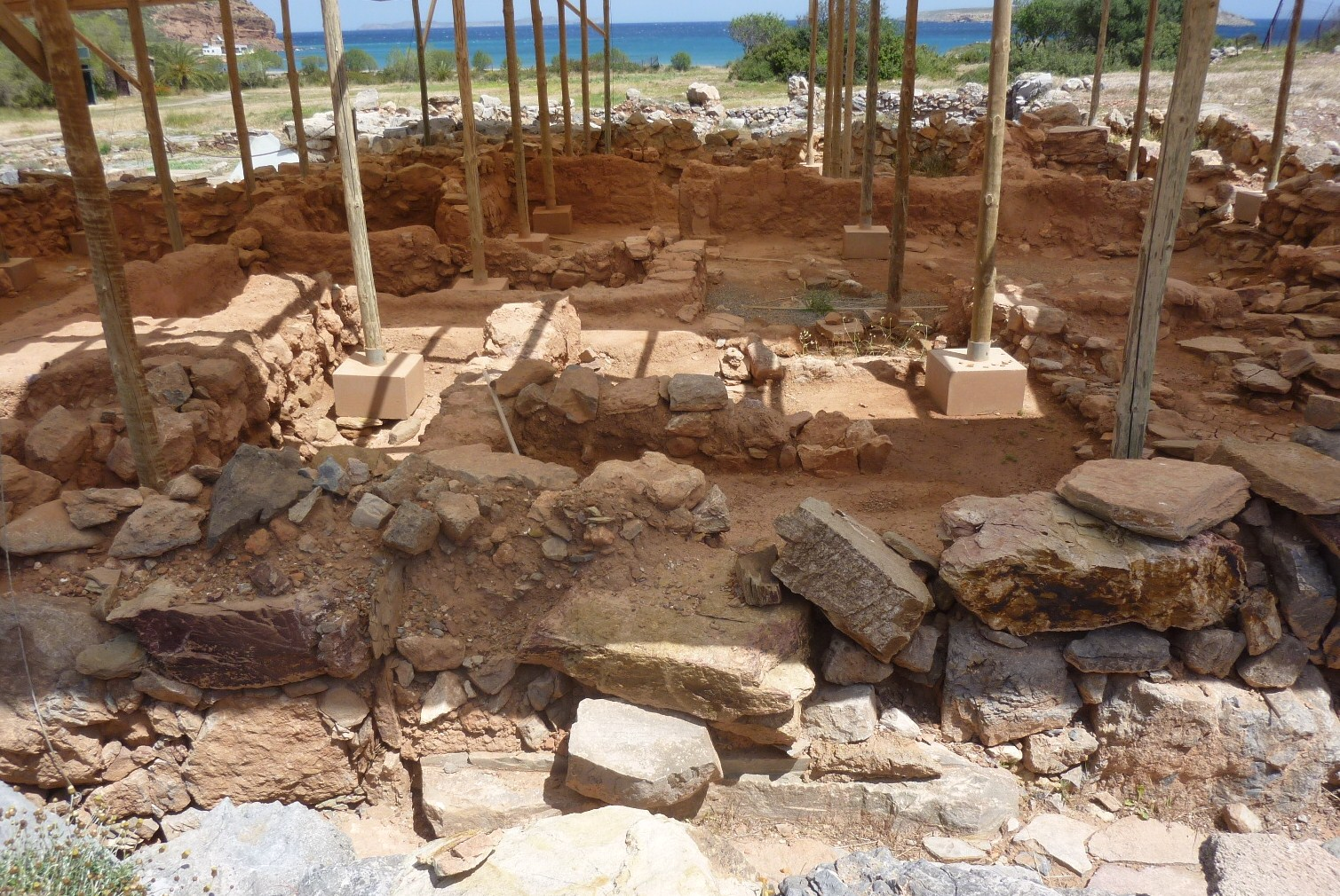 Ruines minoéennes de Roussolakkos (Crète)